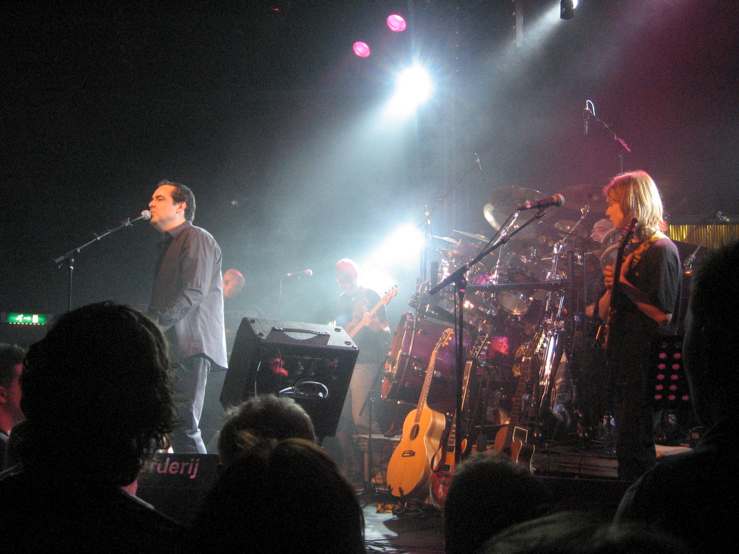 Neal Morse performing in "de boerderij", Zoetermeer (NL)